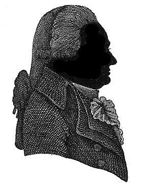 Mr Johannes Diderick van Leeuwen. Jurist, overheidsdienaar en patriot. Woonachtig geweest te Tiel, Utrecht en Kerk-Avezaath. Stichter van het kerkhof 'Ter Navolging' in Tiel.